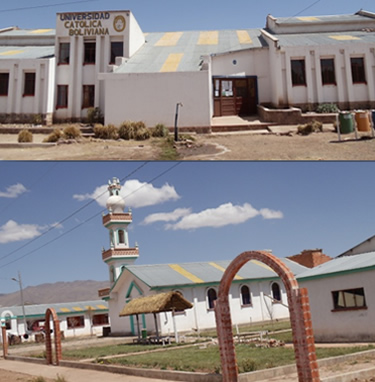 UAC Tiahuanacu